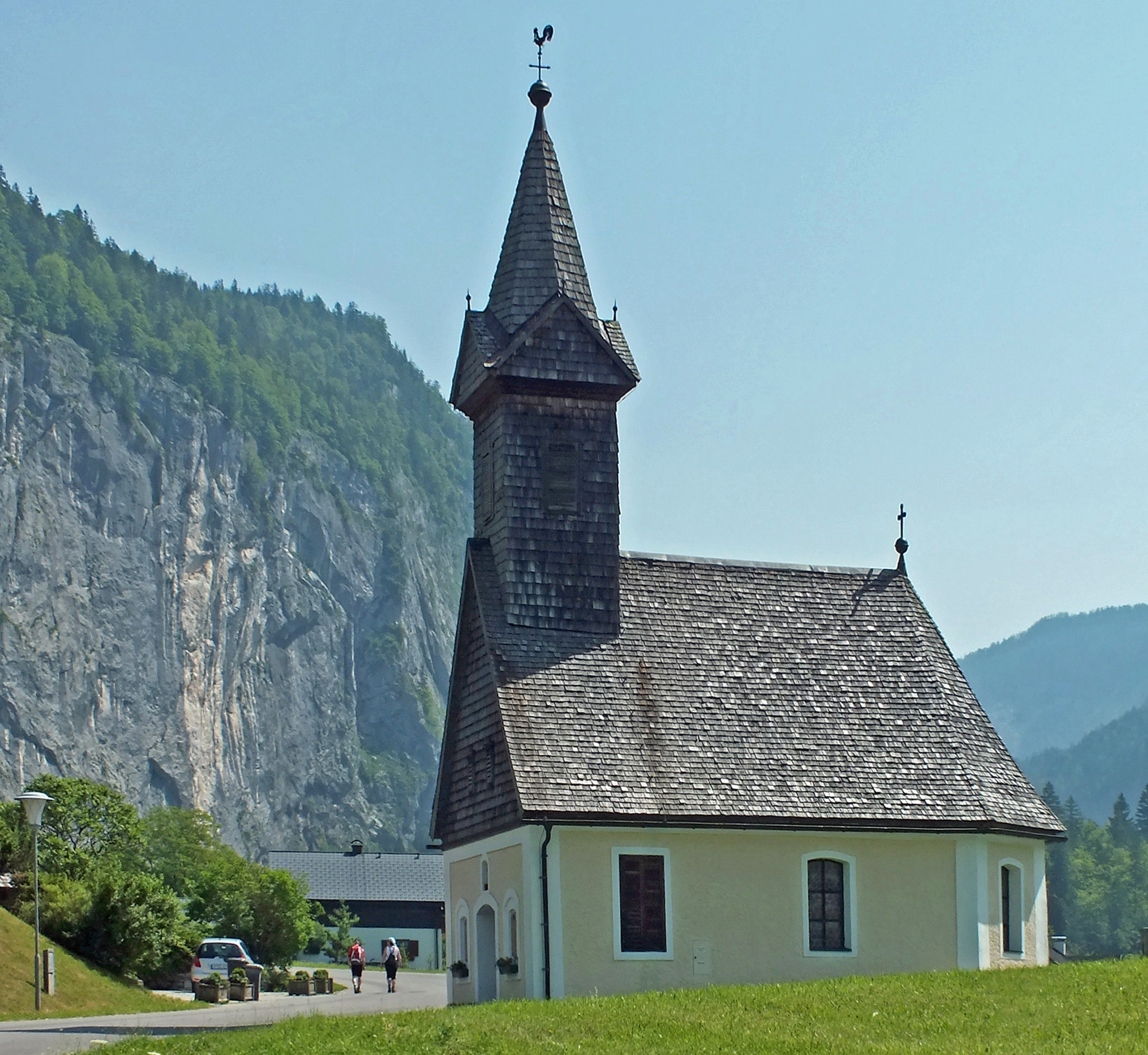 Die Kirche in Gößl